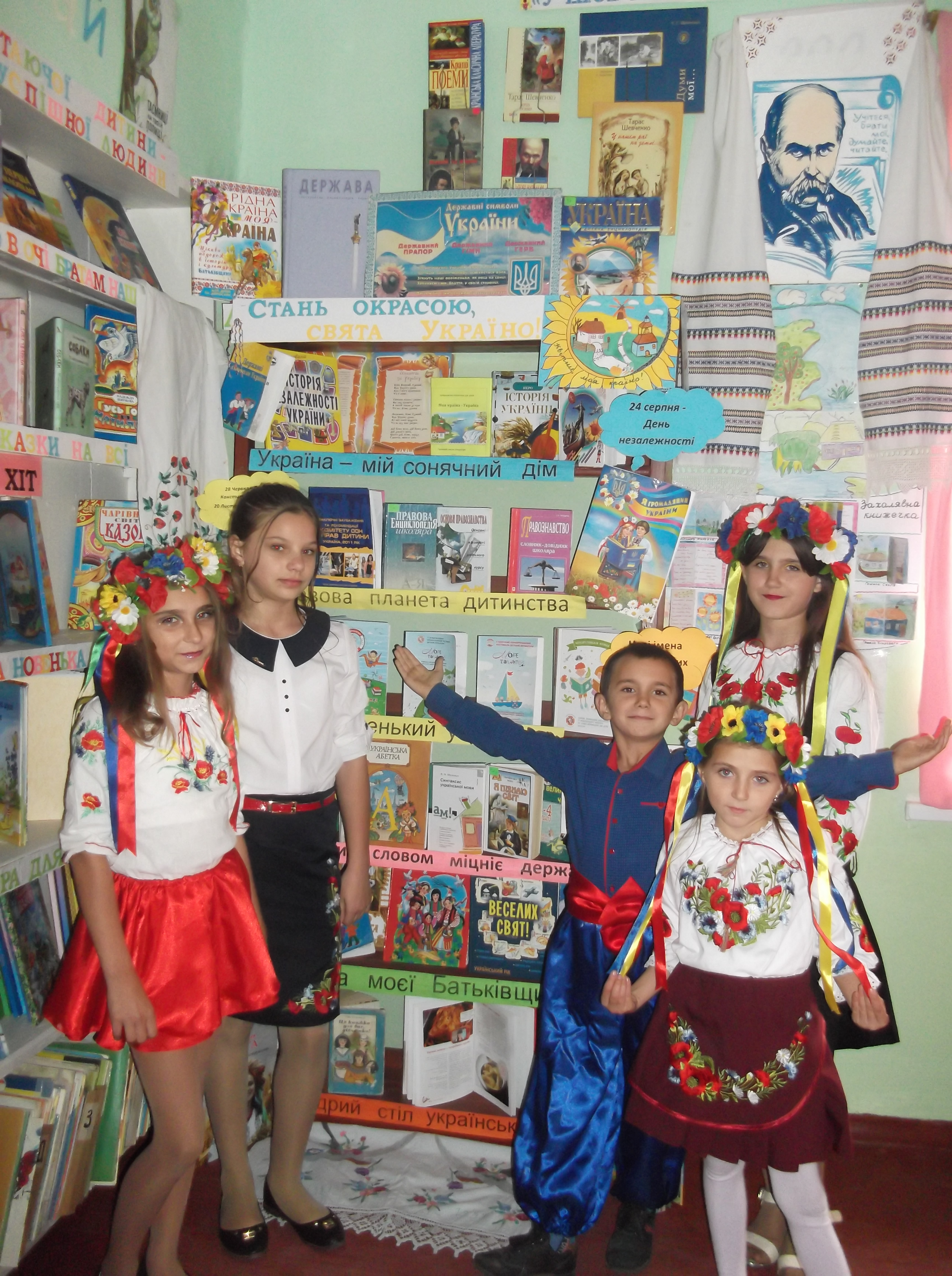 Краєзнавча година " Земле моя найрідніша"